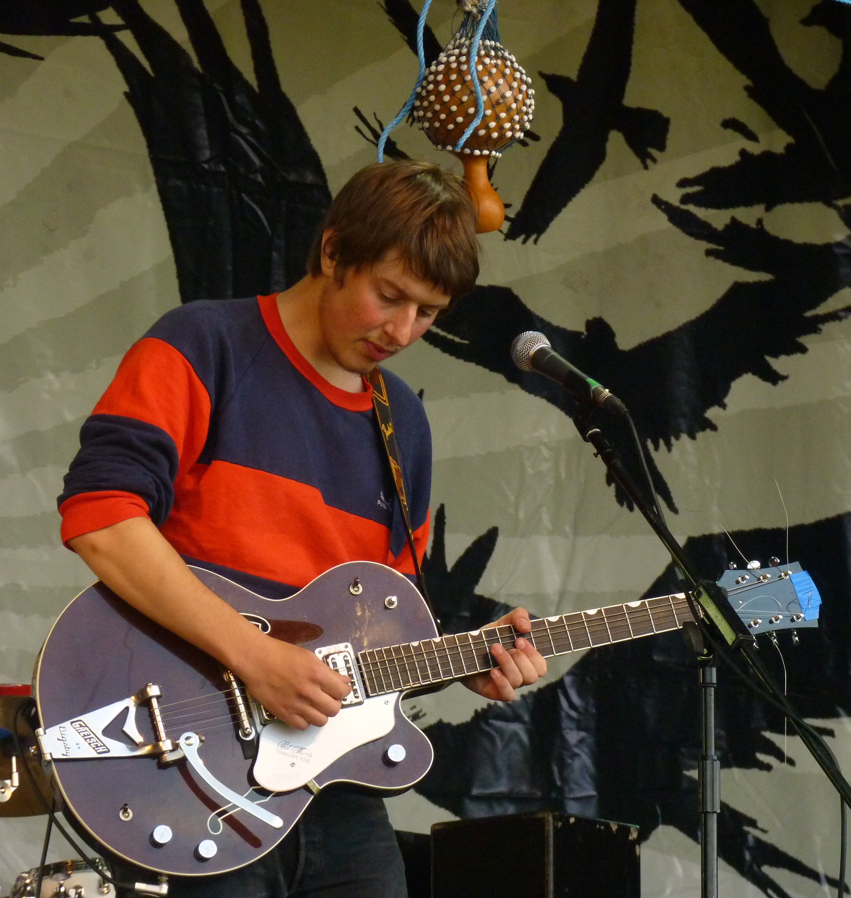 Michael Coles (Litte Comets)